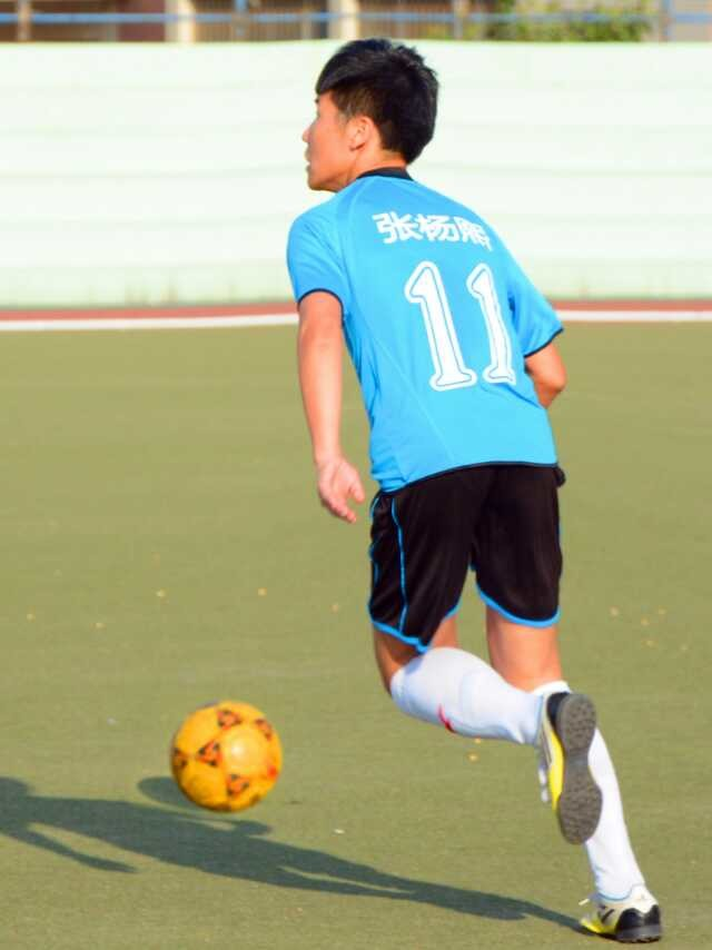 张杨熙在比赛中